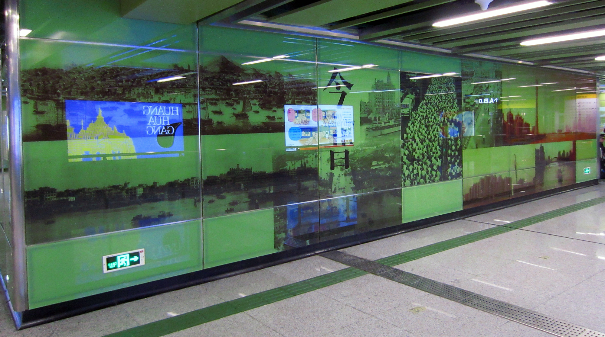 粵語: 海珠廣場站文化藝術牆